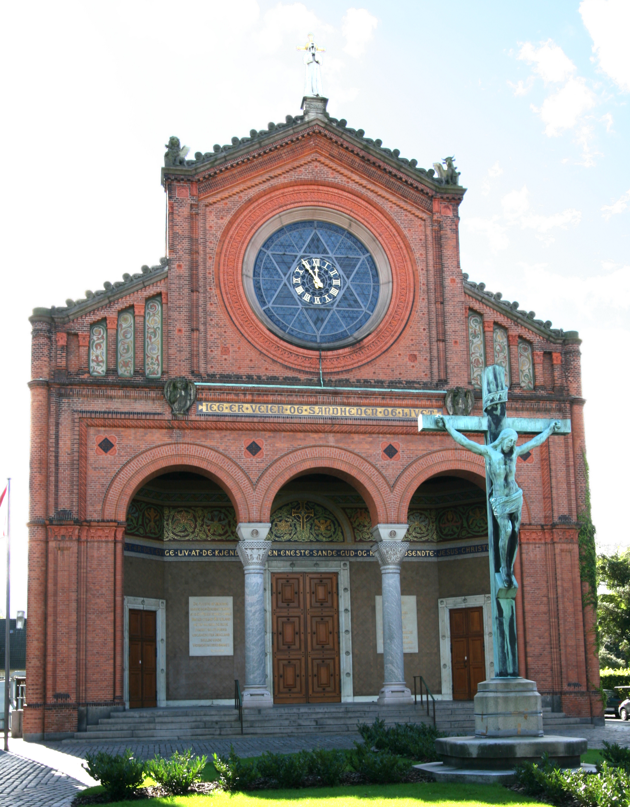 Jesuskirken, Valby, Copenhagen, Denmark Front.